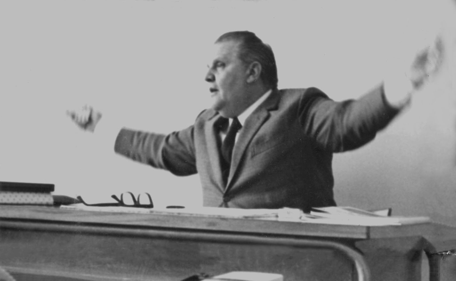 Remigio Ferretti mentre commenta un canto della Divina Commedia